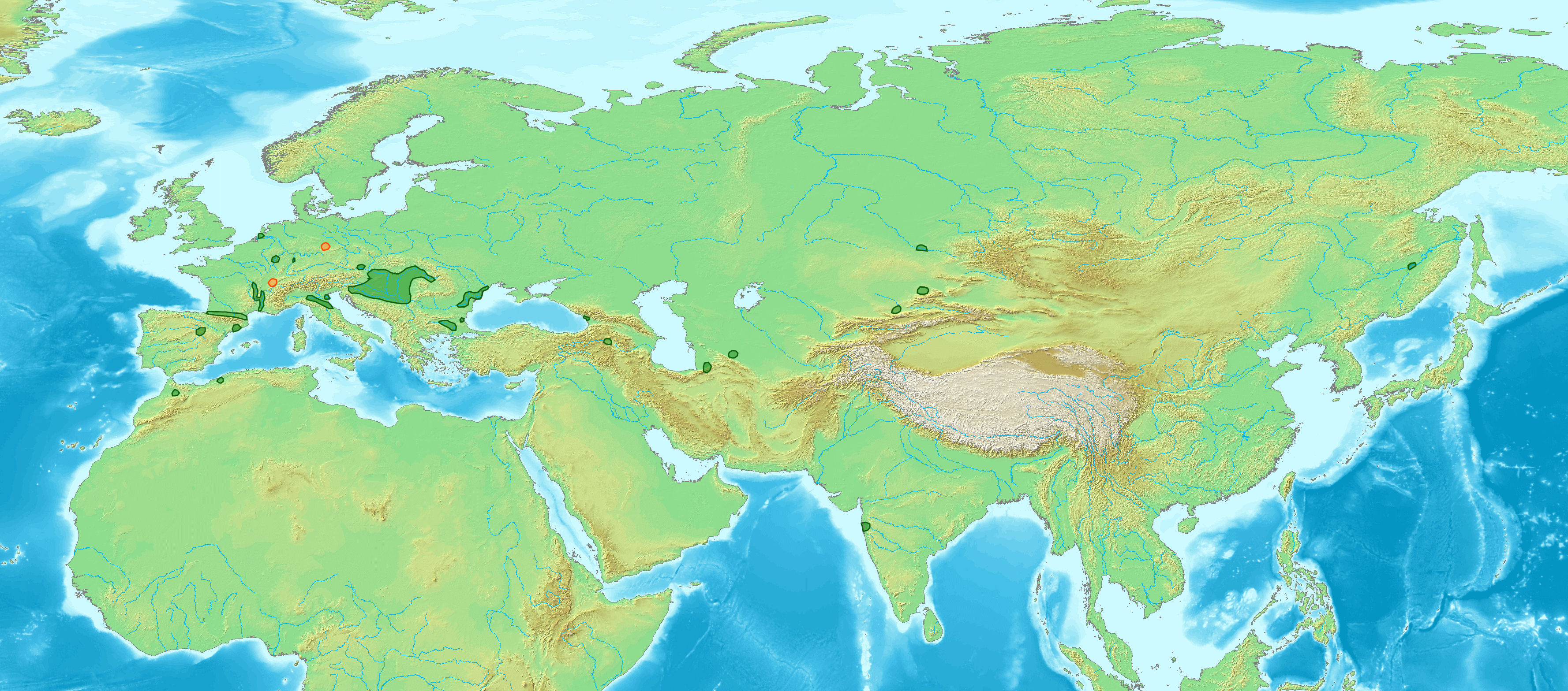 Verbreitung des Auen-Blätterporlings (Lenzites warnieri). Grün rezente, rot fossile Verbreitung